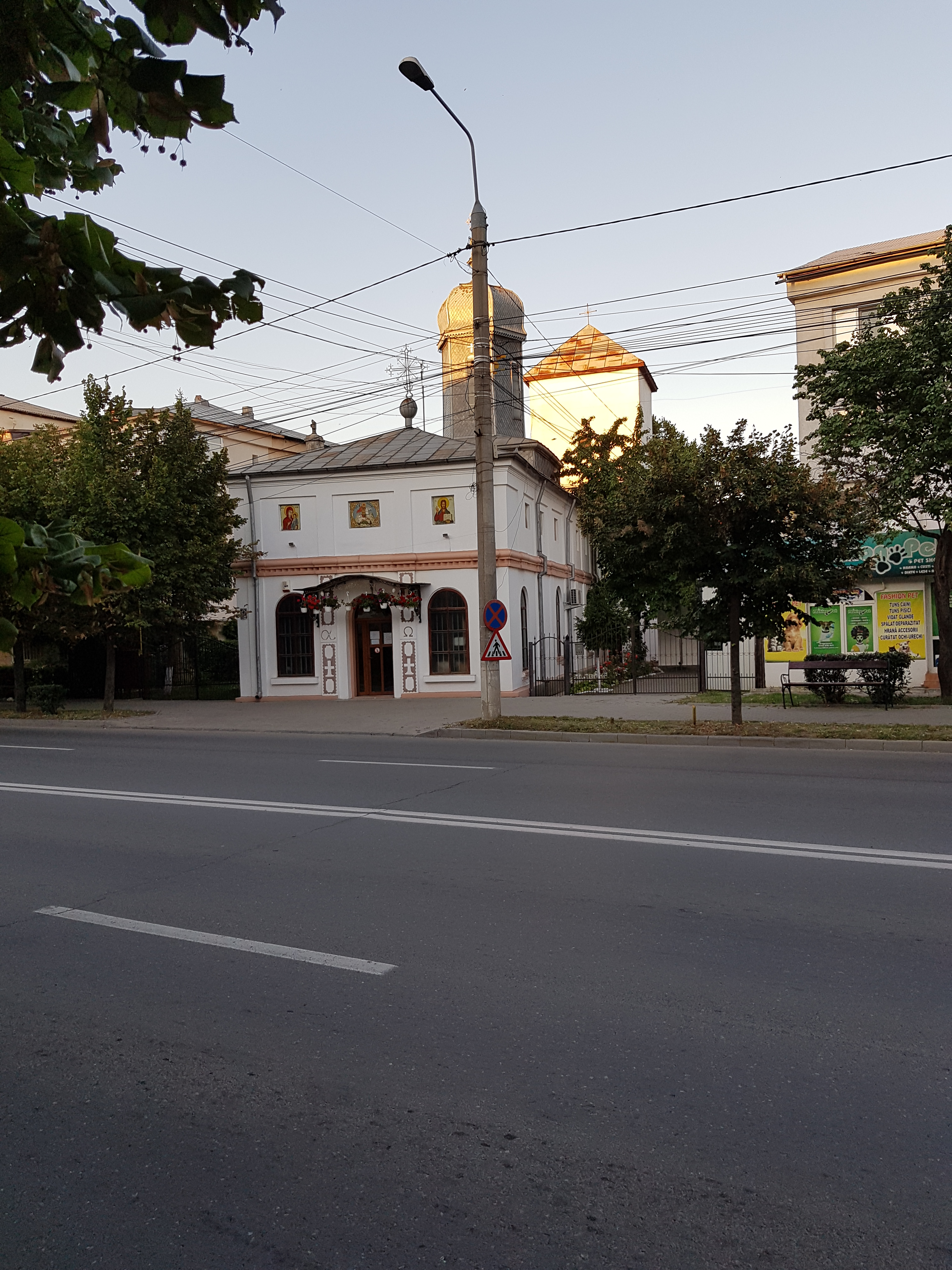 Ansamblul bisericii „Sf. Gheorghe” - Nord